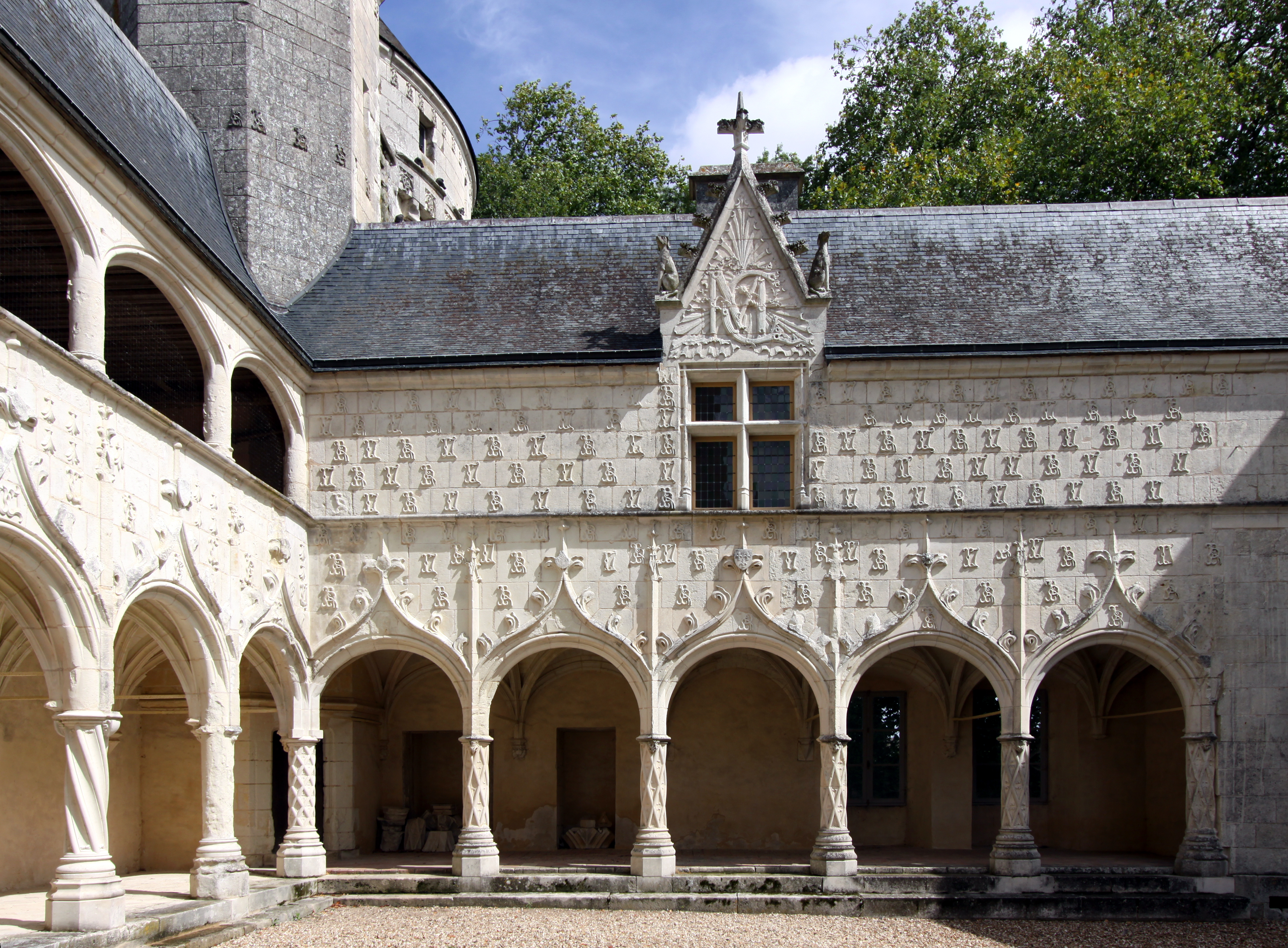 Schloss Argy im französischen Departement Indre - Galerie und mit Initialen verzierte Fassade